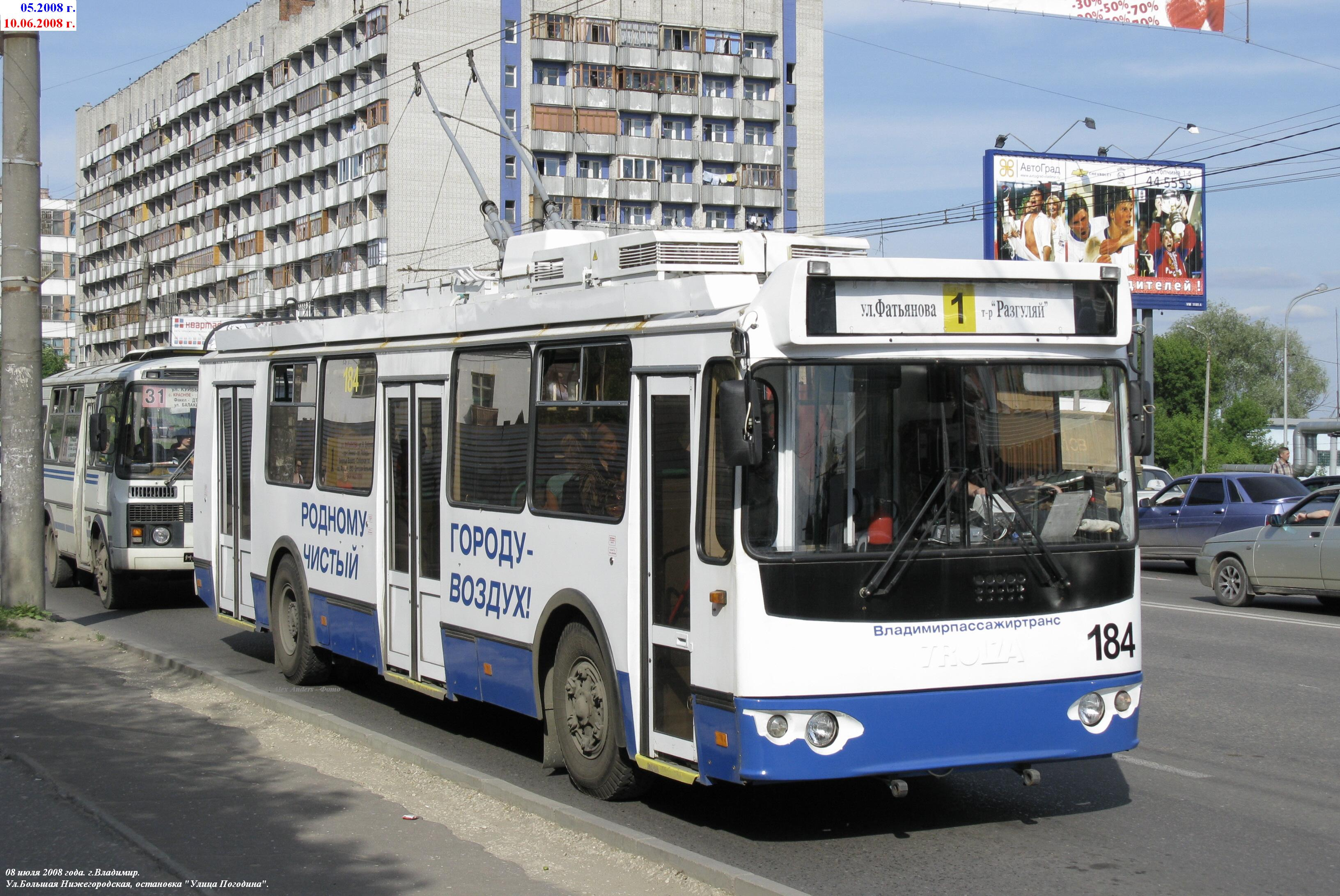 Trolleybus Trolza in Vladimir, Russia